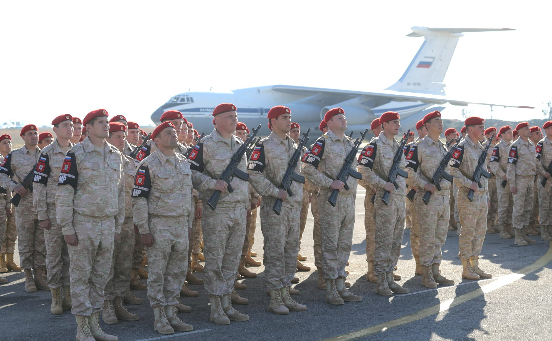 Во время посещения авиабазы Хмеймим в Сирии